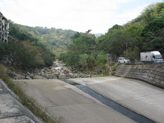 中文（香港）: 香港荃灣曹公潭及引水道，攝於照潭徑